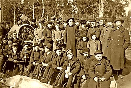 Рабочие на могиле Георгия Гапона на Успенском кладбище